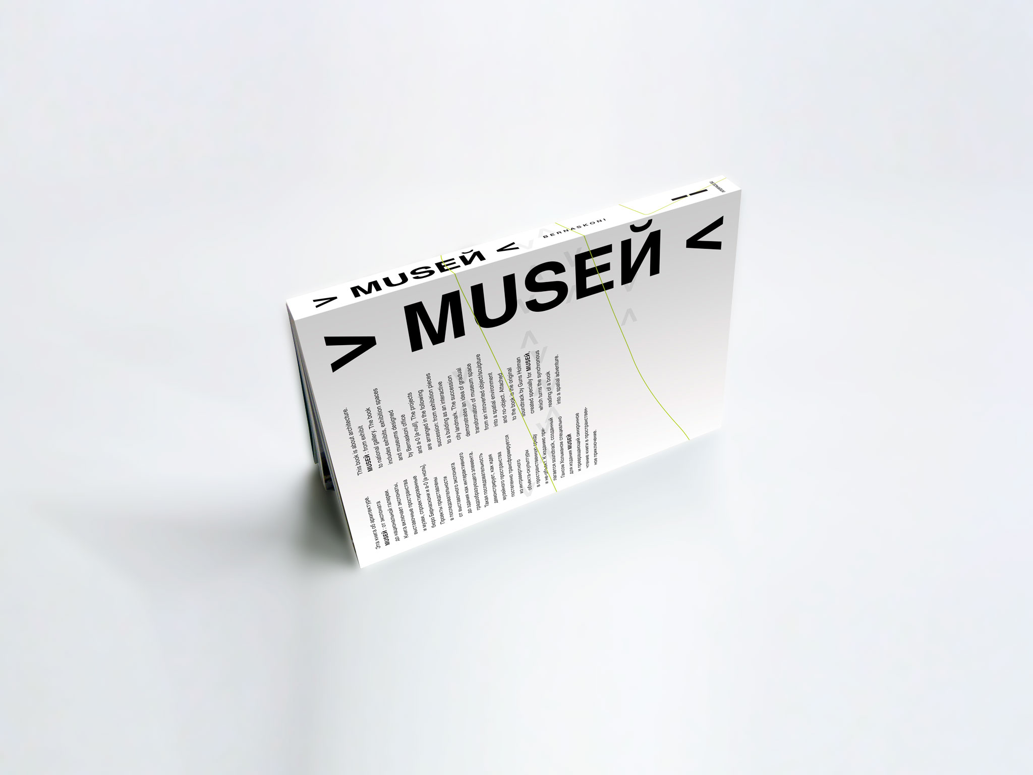 Book design. «MUSEЙ». Книга «МУЗЕЙ».